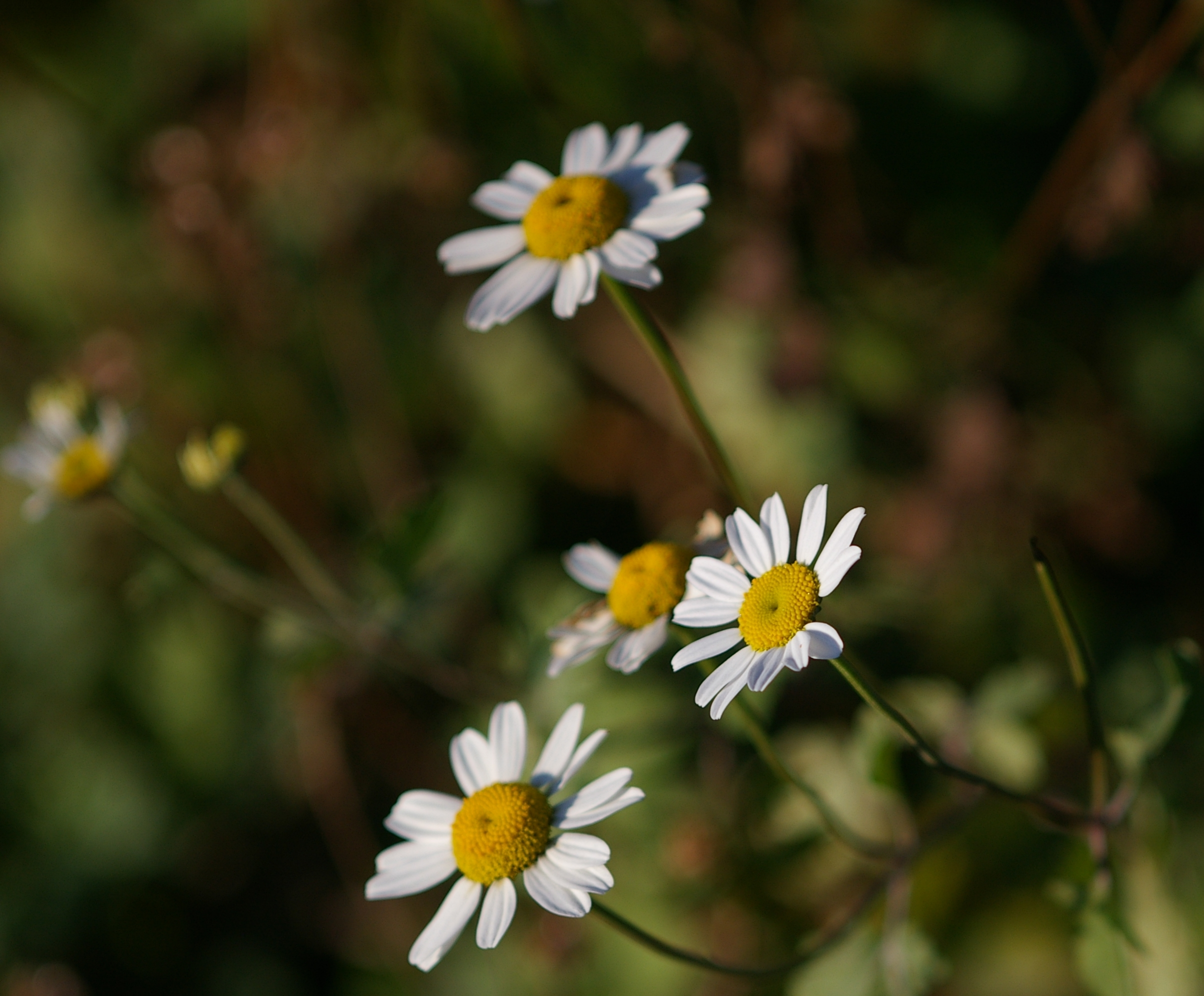 Tanacetum Parthenium (Li.) Sch. Bip. Jardin Alpin du Jardin des Plantes, Paris.